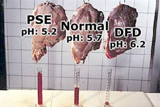 A figura mostra a correlação entre cor, pH e perda de água dos três tipos de carne discutidos.